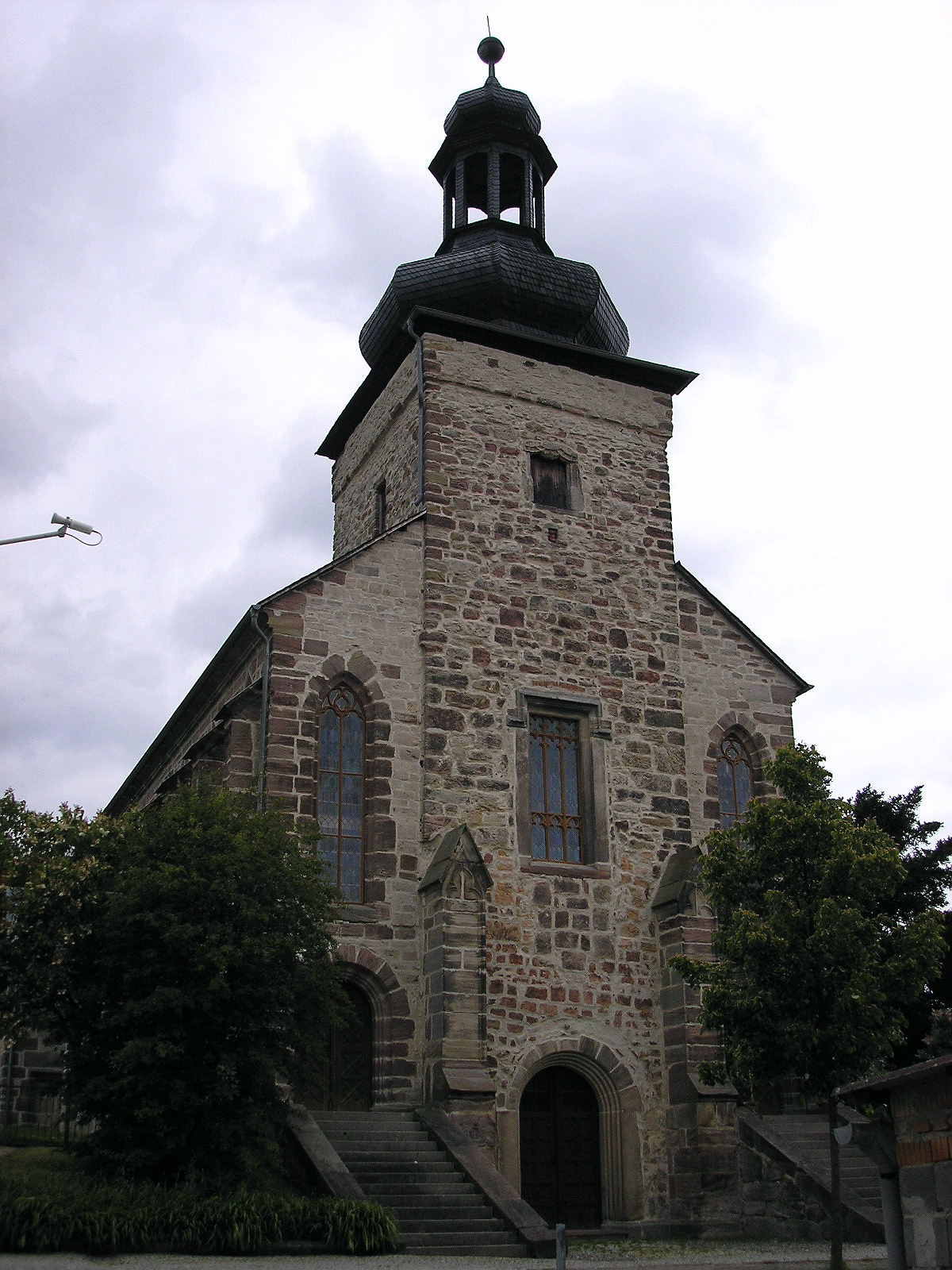 Die Kirche von Teichel (Thüringen).